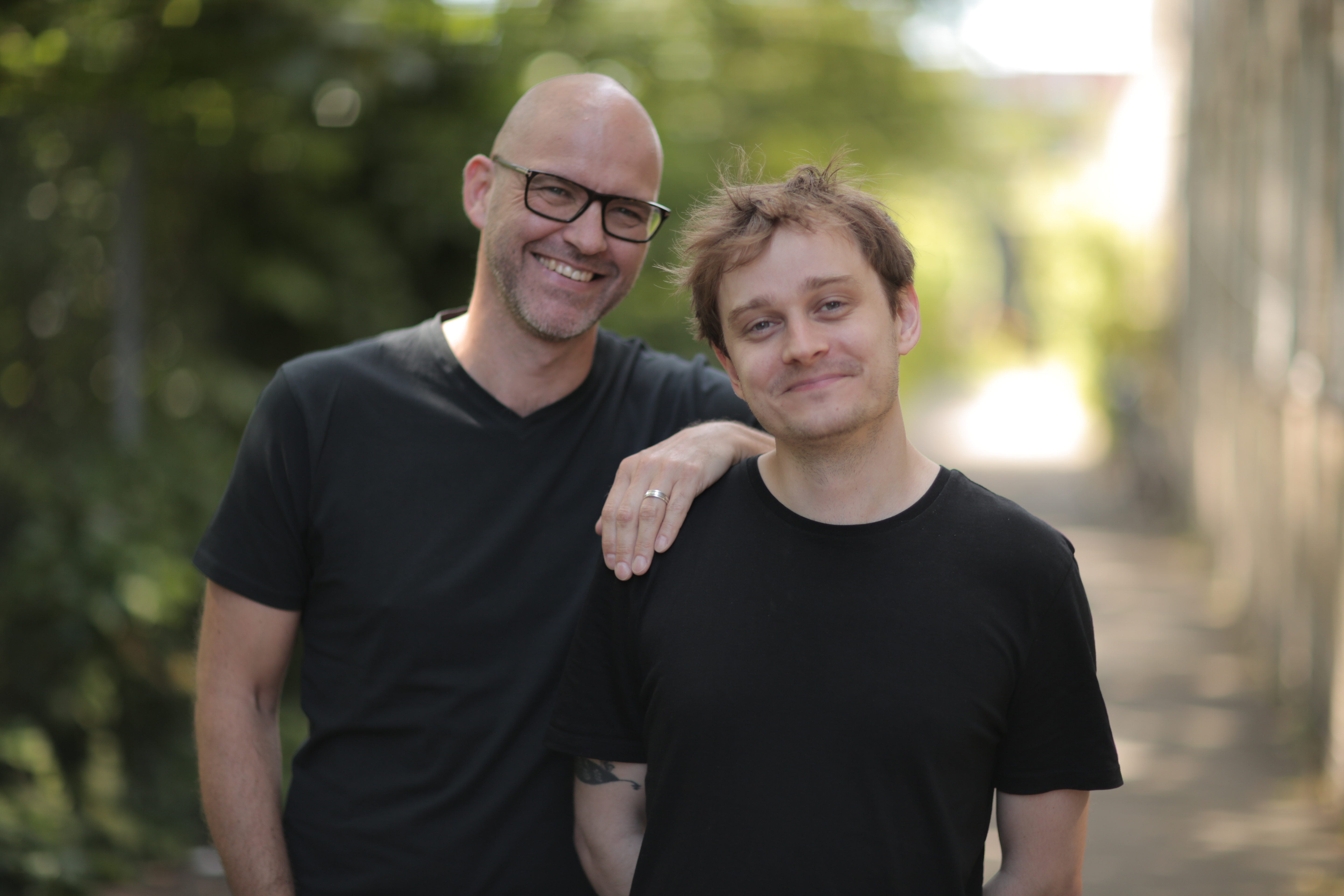 Elias Eliot og Jacob Ege Hinchely. Fotograf: Theis Mortensen